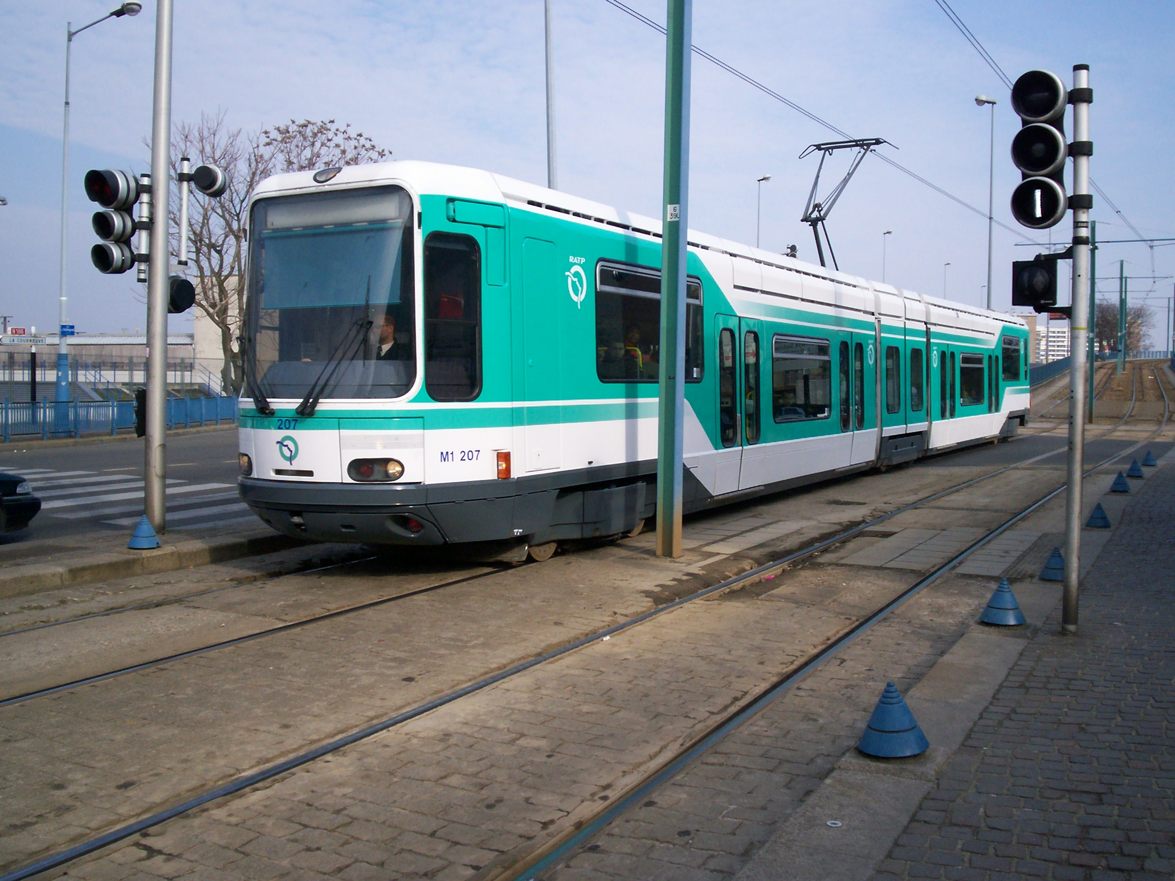 T1 vers Hôpital Avicenne